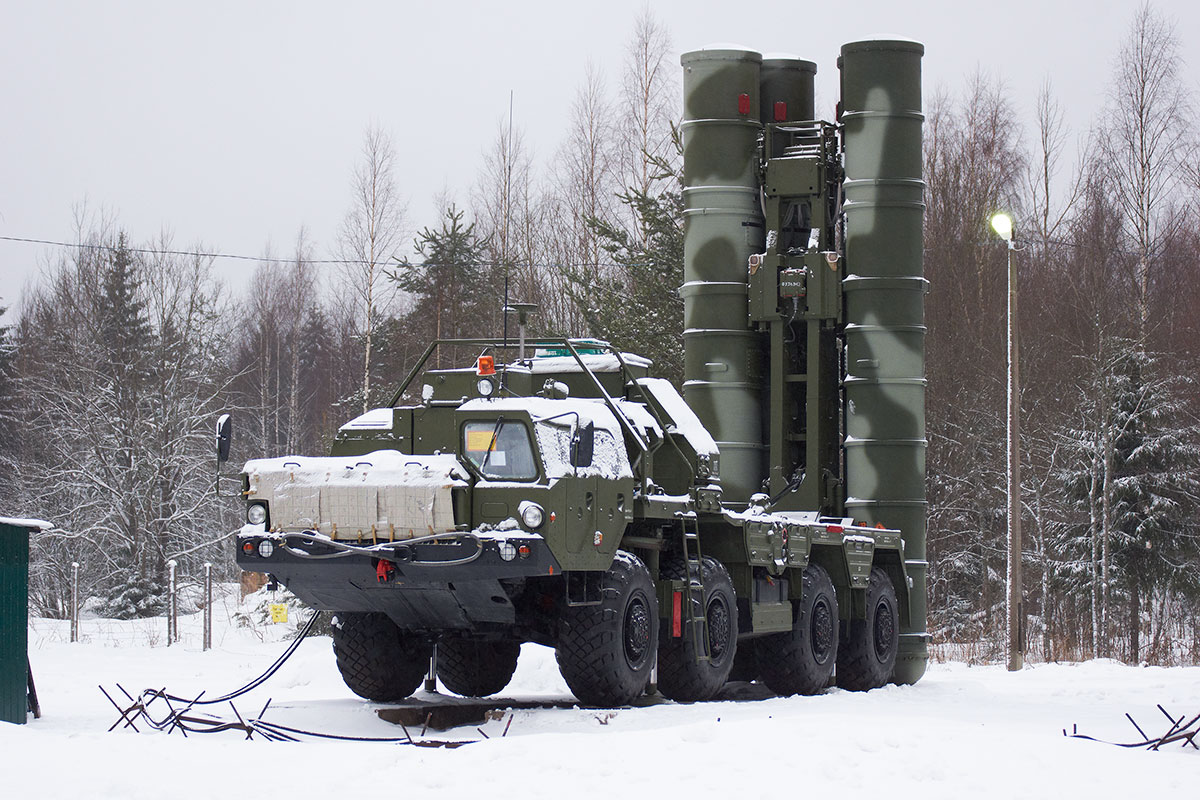 Приведение в боевую готовность расчётов ЗРС С-400 «Триумф» 1488-го зенитного ракетного Краснознаменного полка в Ленинградской области.